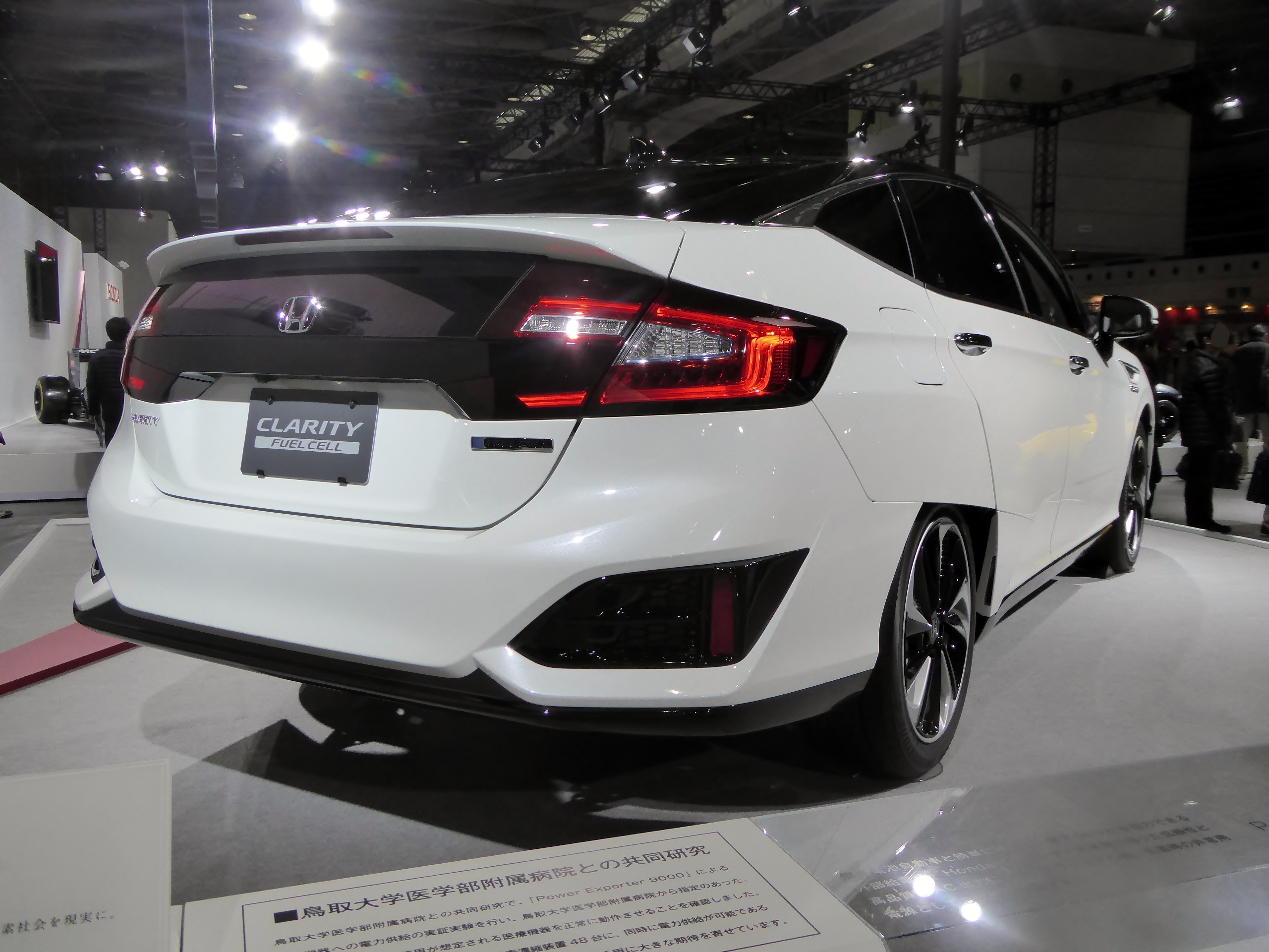 大阪モーターショー2015においてホンダ・クラリティフューエルセルを撮影。